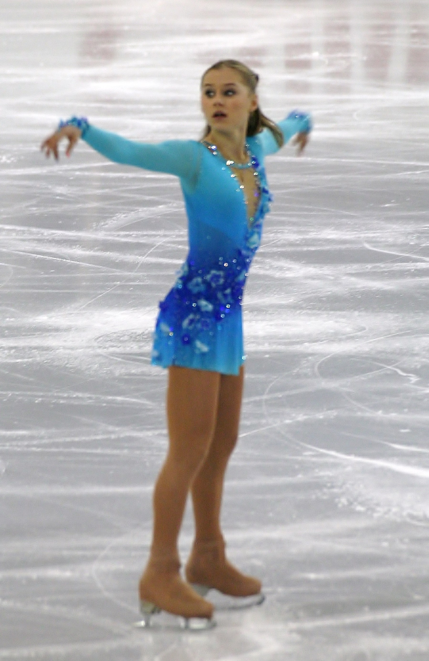 Серафима Саханович (Россия) на финале Гран-при среди юниоров сезона 2014-2015.